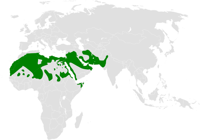 Alaemon alaudipes distribution map, based on